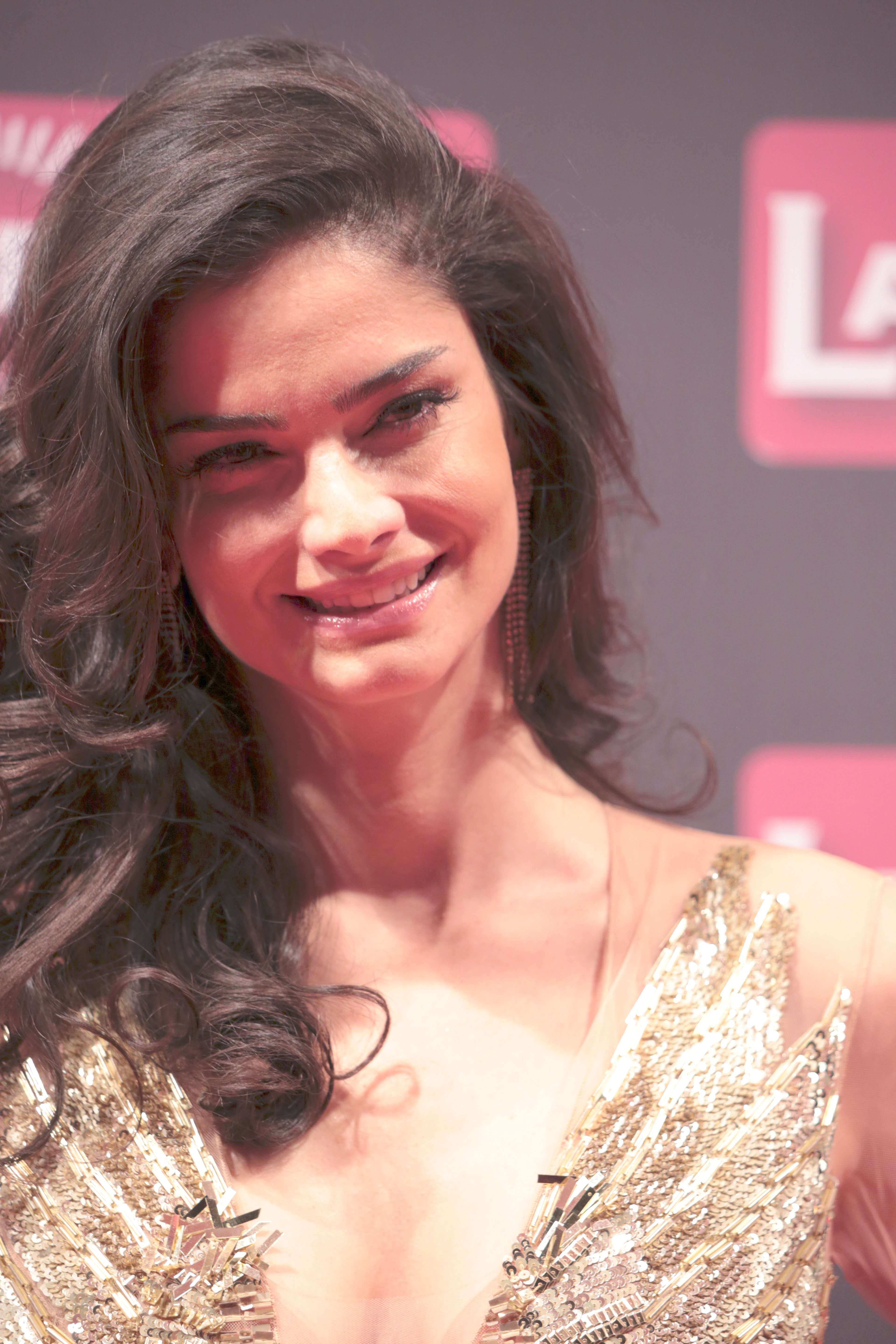 Shermine Shahrivar bei der Lambertz Monday Night 2018.